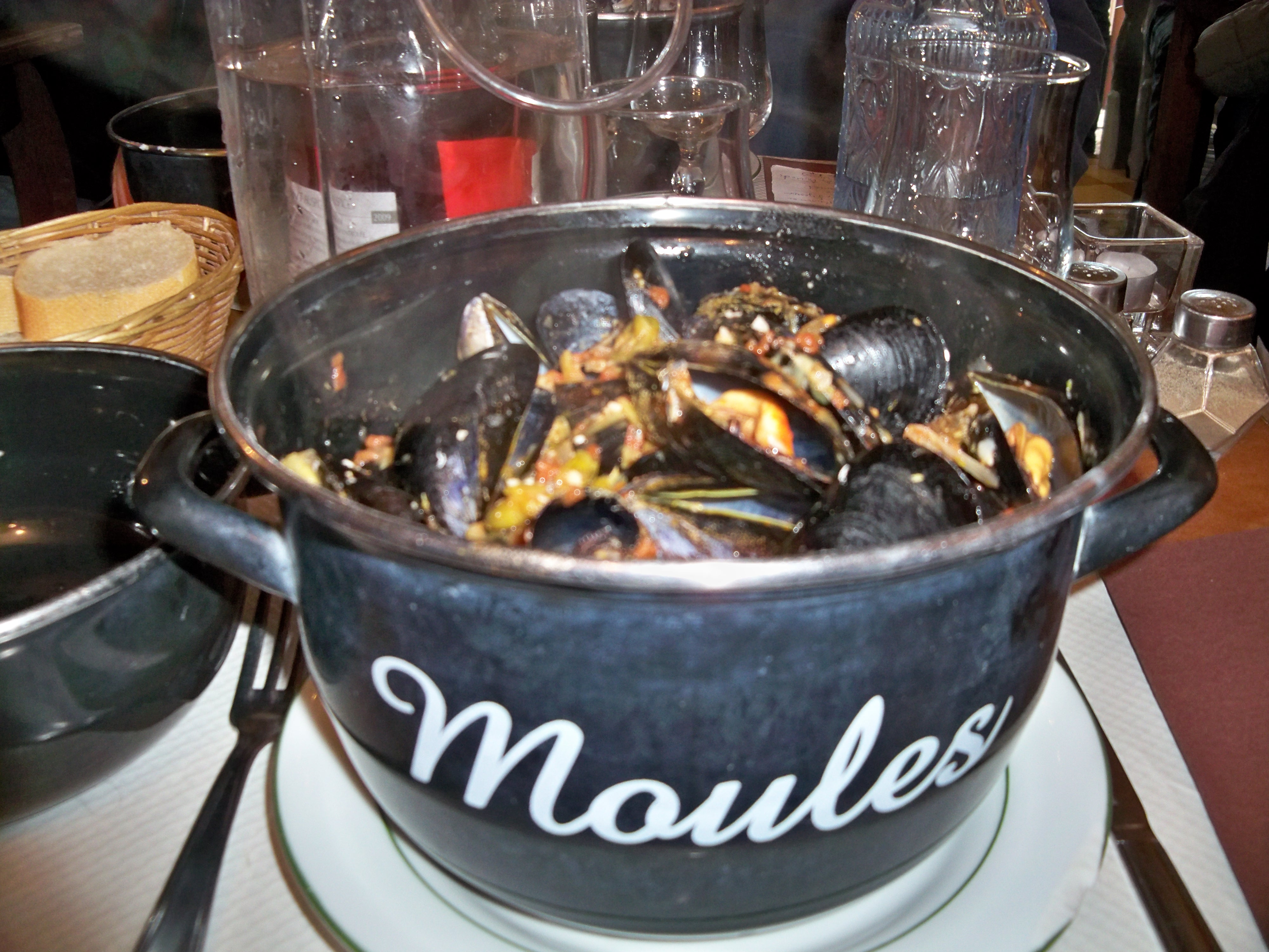 Moule à la provencale, spécialité entre nord et sud